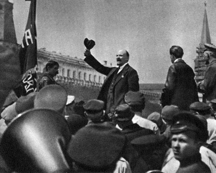 Ленин на параде частей Всеобуча в Москве.